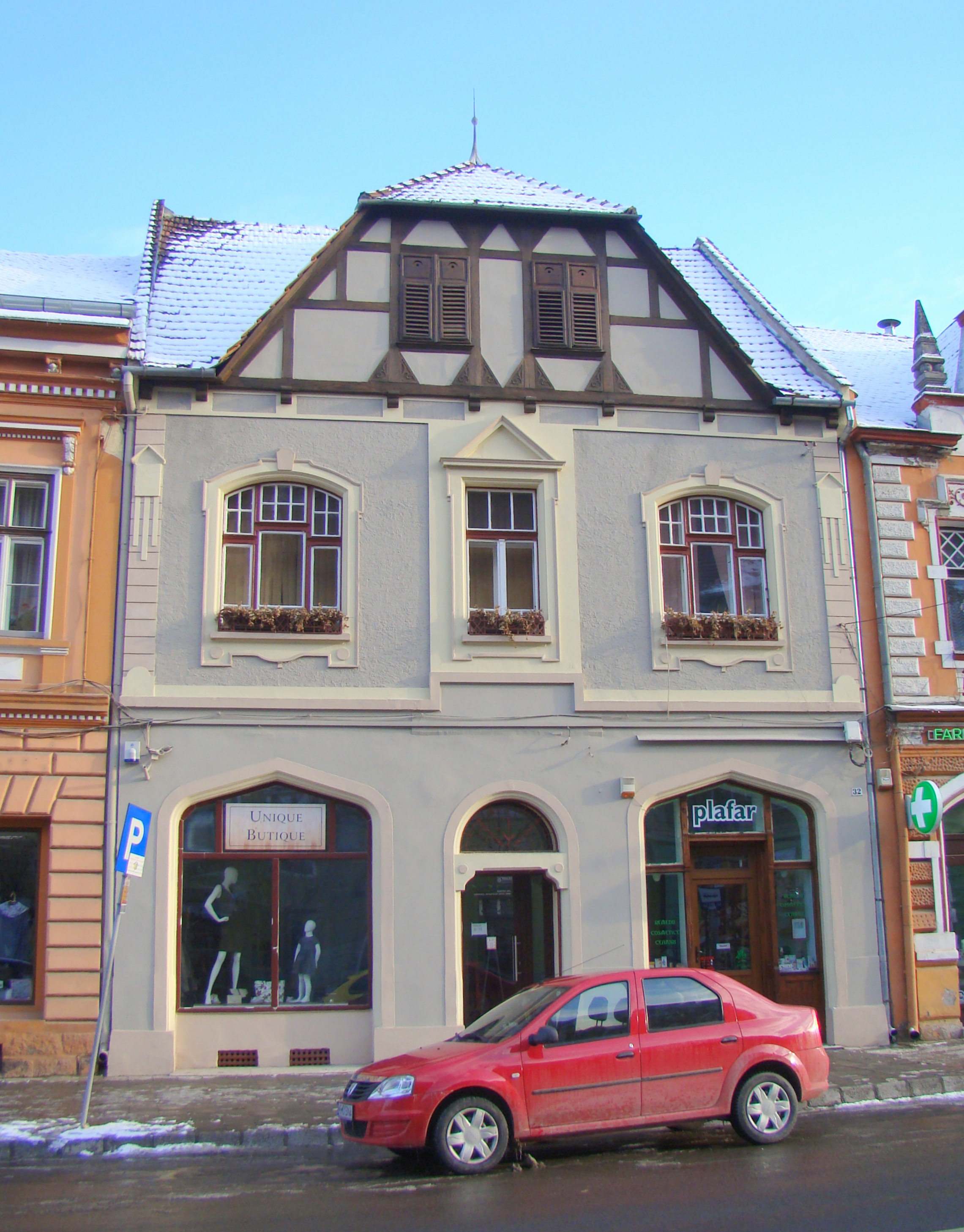 Casă, municipiul Sighișoara, Piața Oberth Hermann 32 1902